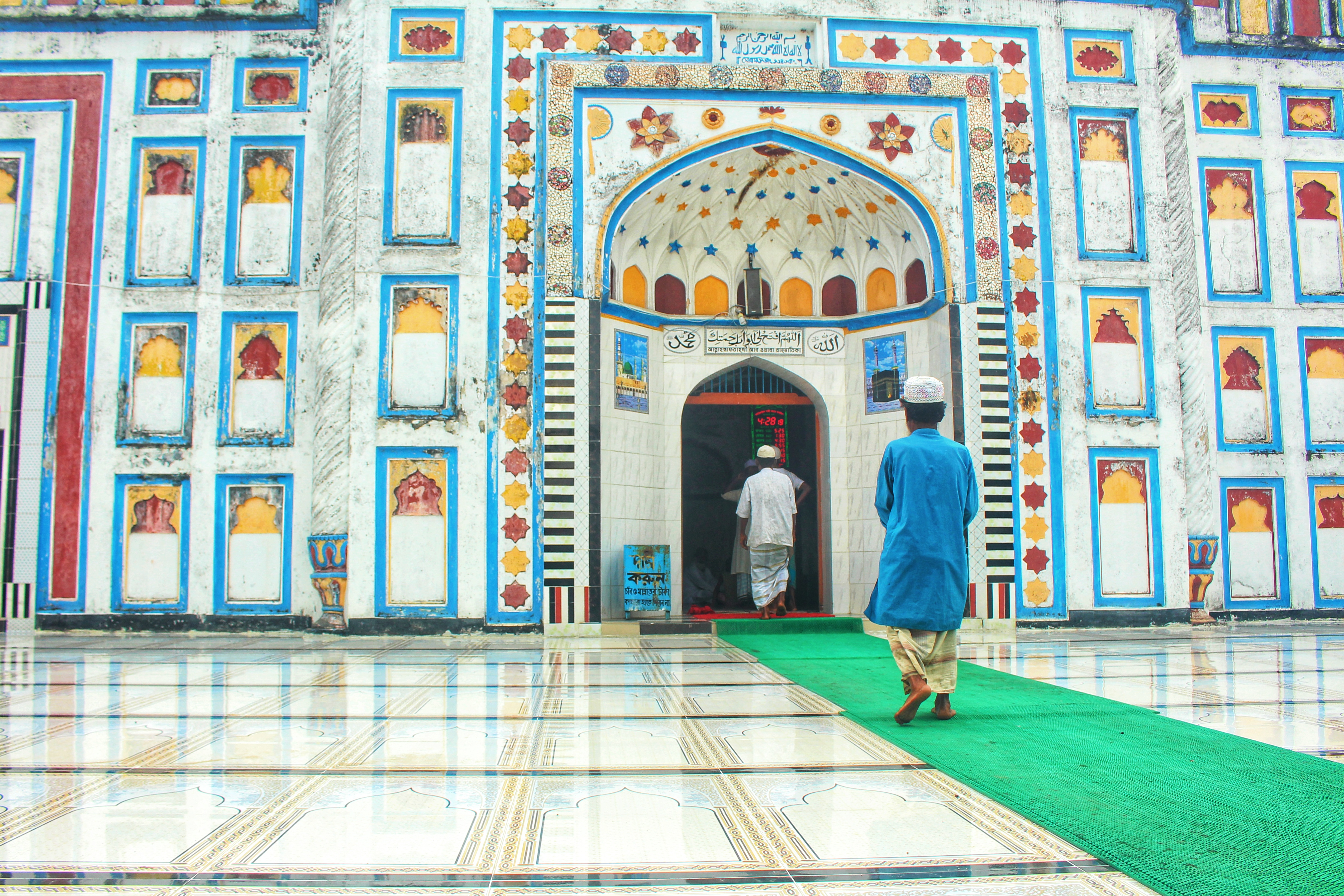 আড়িফাইল মসজিদ